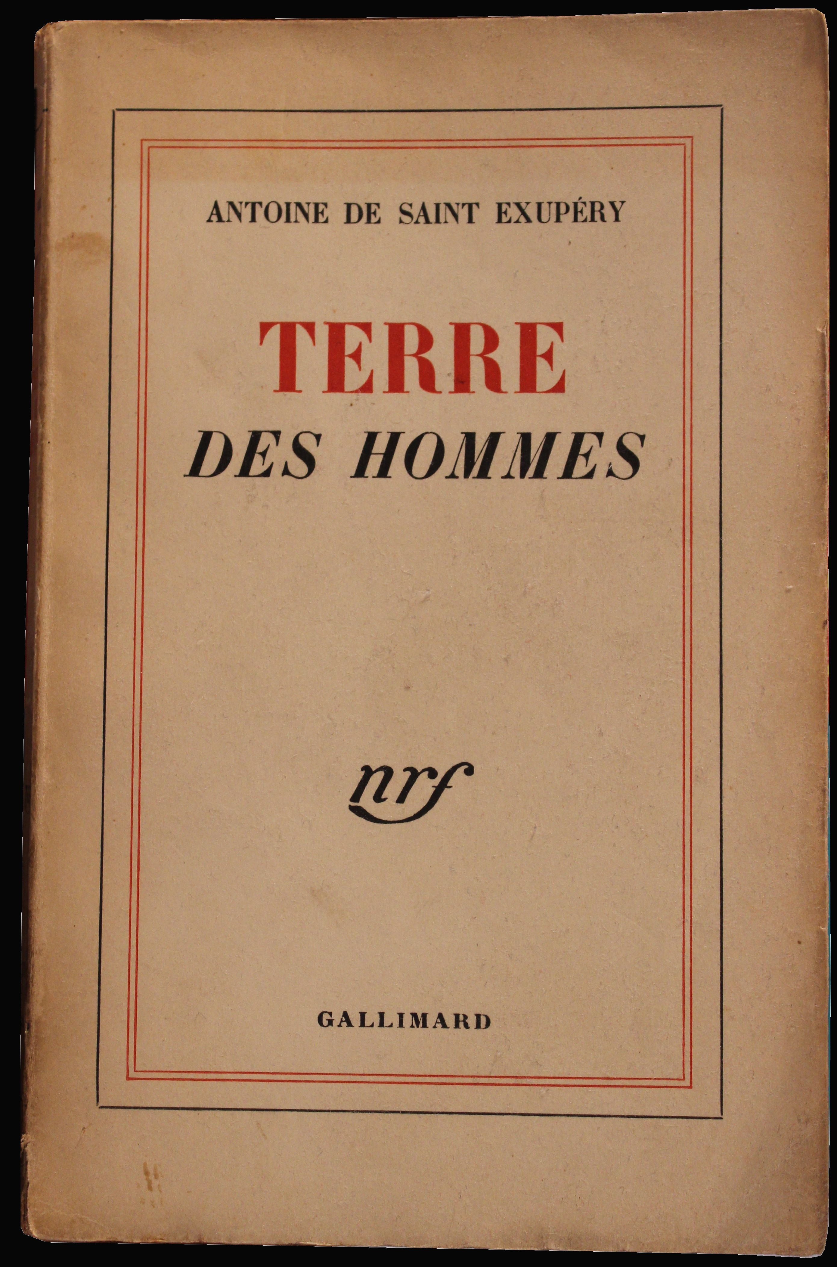 Première de couverture du livre "Terre des hommes", écrit par Antoine de Saint Exupéry et publié aux éditions Gallimard, en 1939.